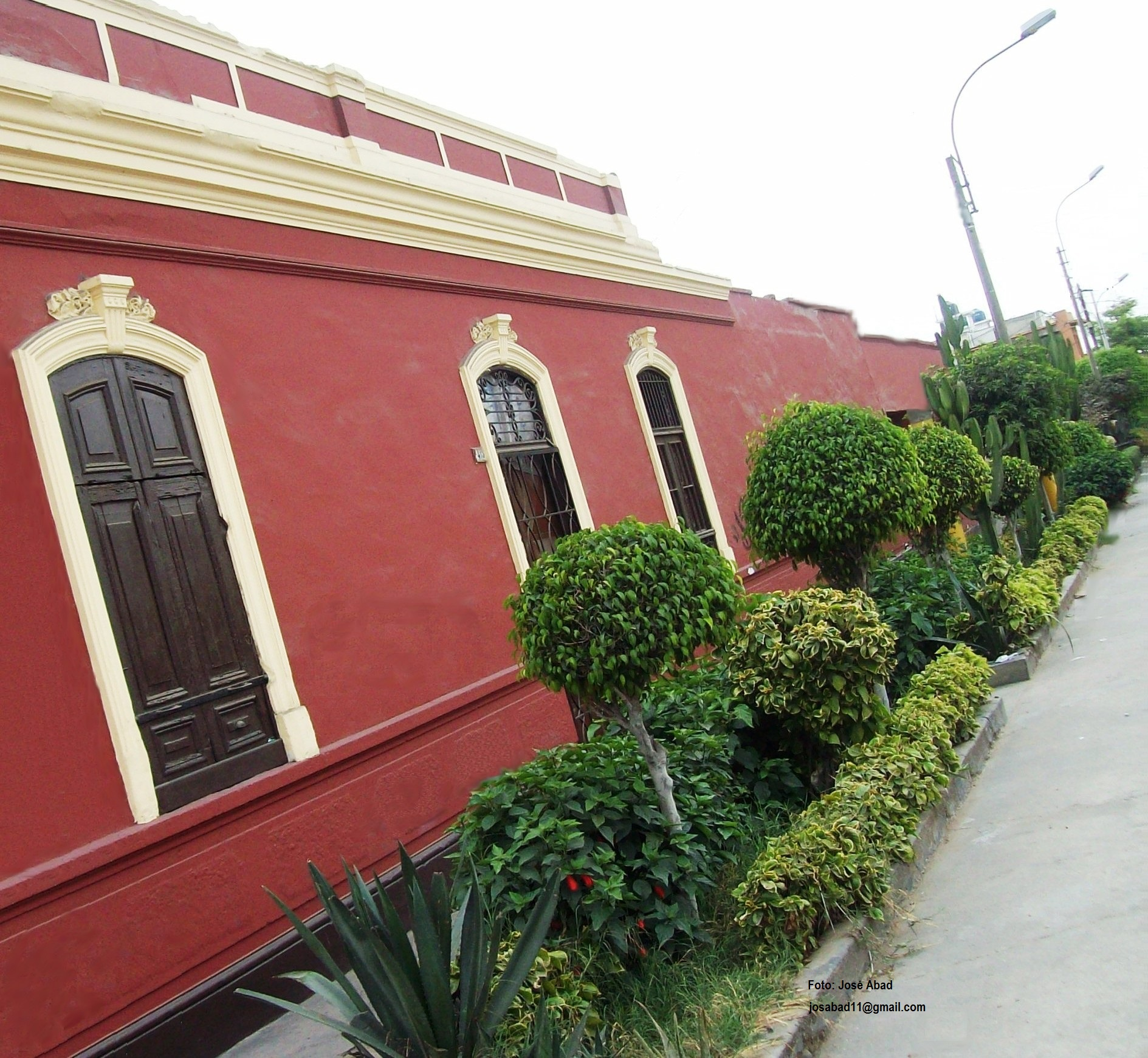 Parte lateral de la Villa Esperanza (1929) en la cuarta cuadra del jirón Joaquín Olmedo.